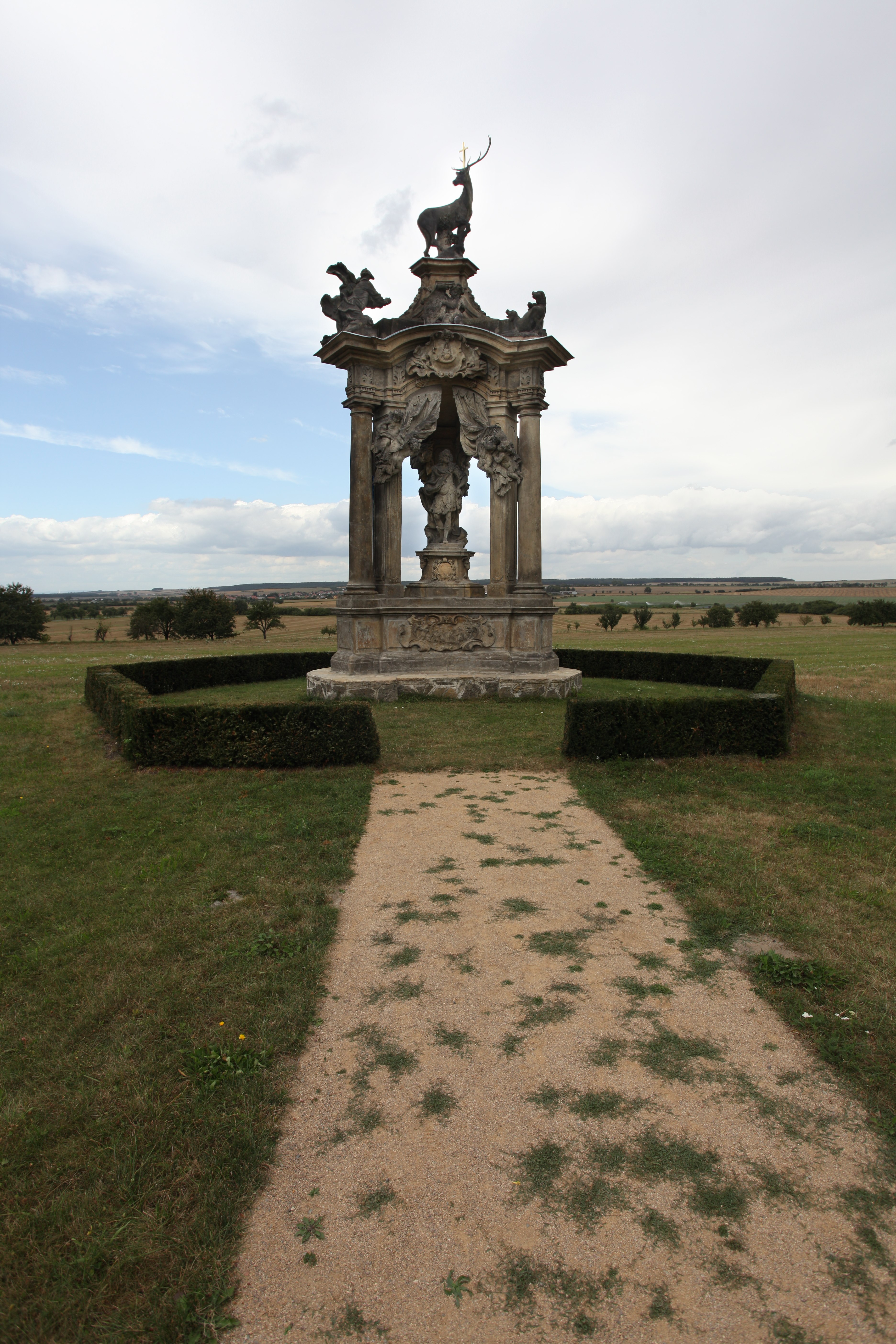 Pomník císaře Karla VI. u Hlavence vytvořil roku 1725 Matyáš Bernard Braun